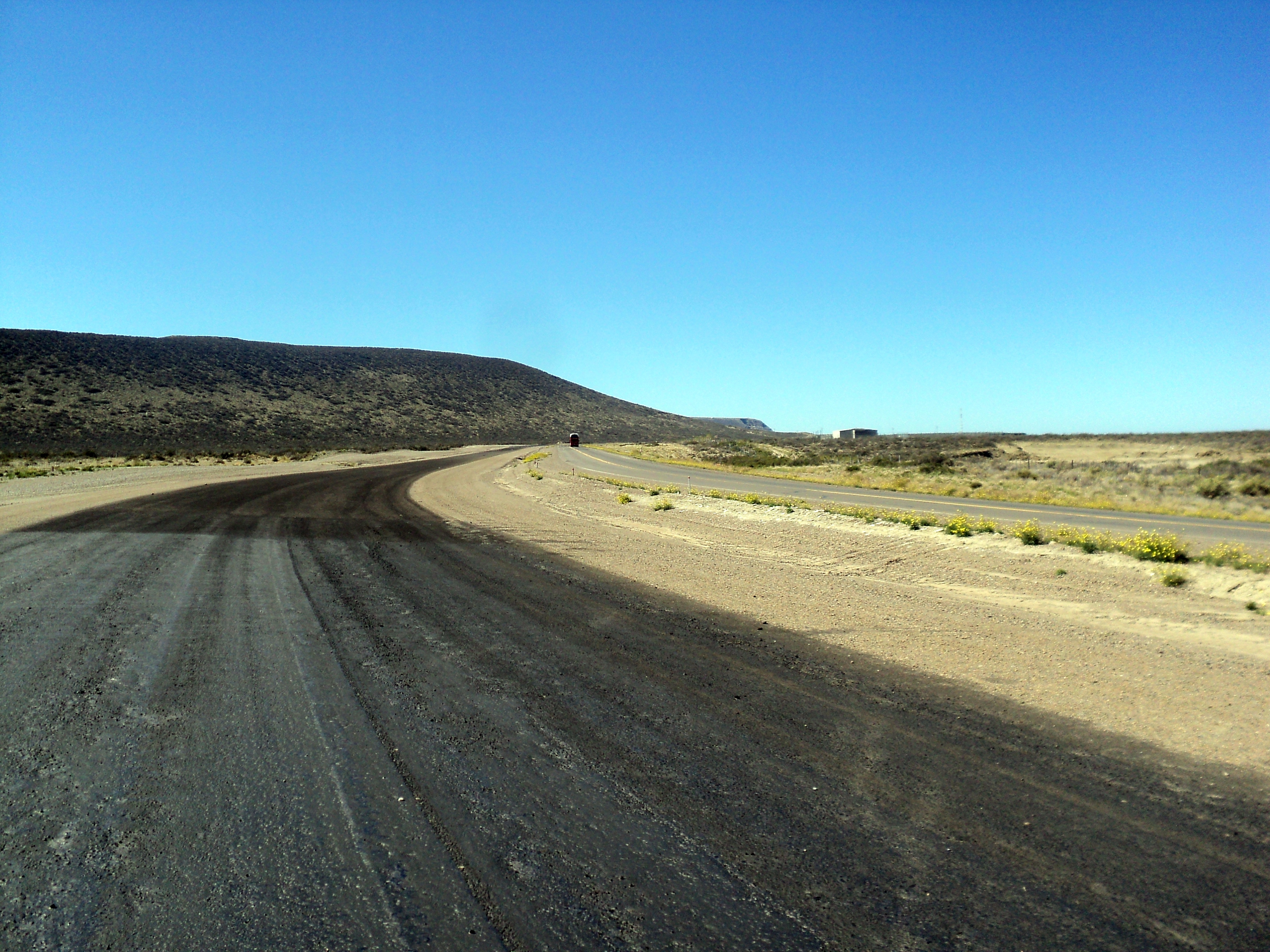 La autovía cerca de la Playa La Herradura